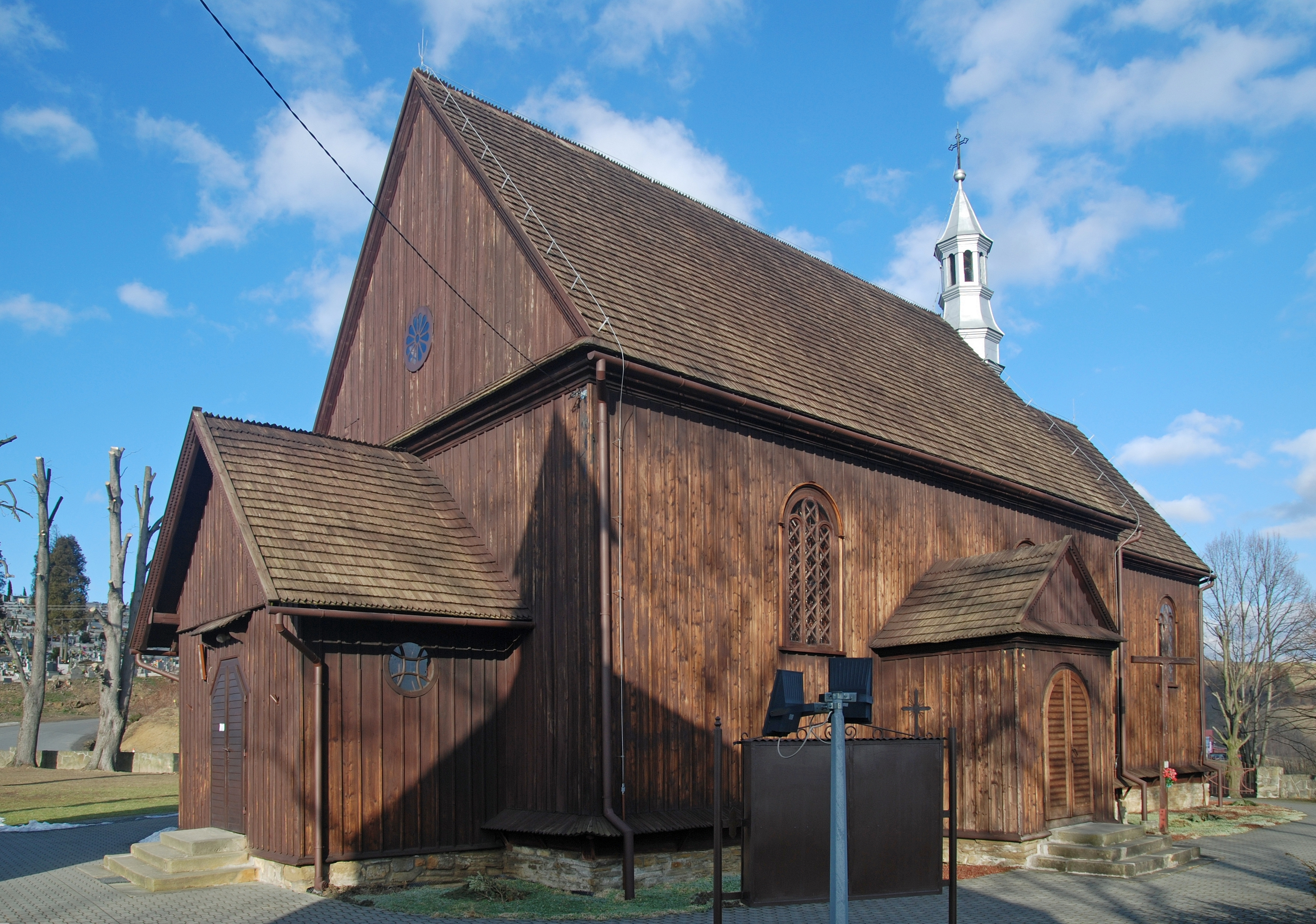 wieś Wilczyska (województwo małopolskie)